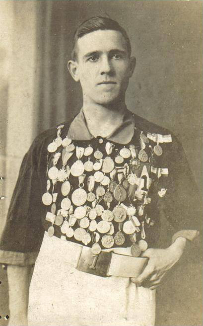 Ramón Unzaga Asla (Bilbao, España, 1894 - Cabrero, Chile, 31 de agosto de 1923) fue un contador y jugador vasco de fútbol, nacionalizado chileno. Participó en los primeros años de la selección de fútbol de Chile, con la que jugó 8 partidos internacionales oficiales, incluidos los de los Campeonatos Sudamericanos de 1916 y 1920. Su debut fue el 2 de julio de 1916 y anotó su único gol por la selección chilena en un partido amistoso contra la Federación Platense. En Chile es conocido como la persona a quien se le atribuye la invención de la «chilena», una maniobra en el fútbol también conocida como «chalaca», en enero de 1914.